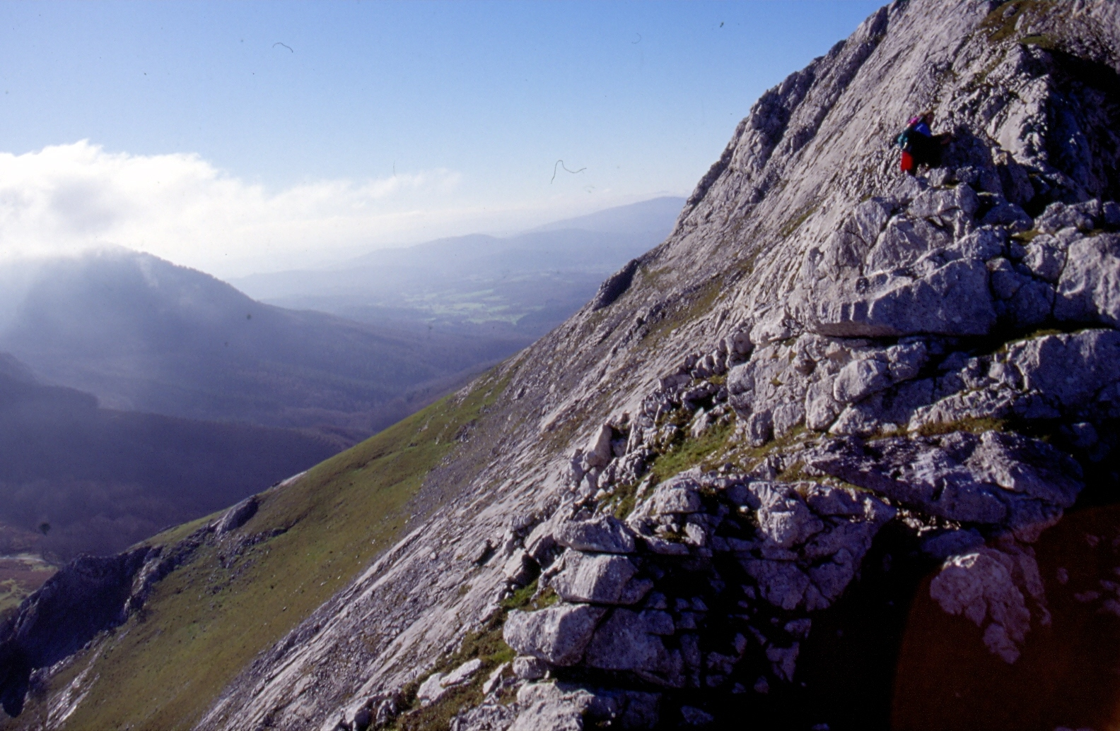 Urgoniar fazies geologikoa Anboto mendiaren hegoaldean, Eskilar izeneko ezproian.